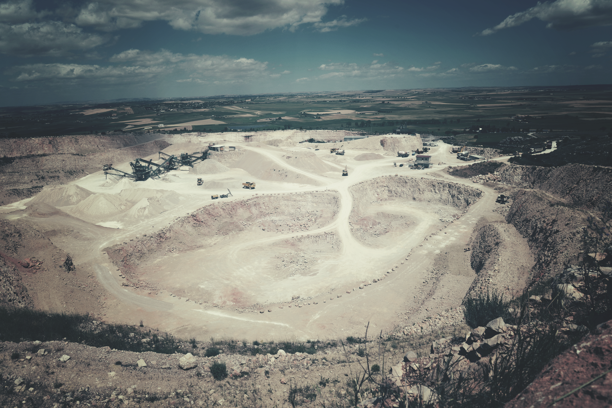 Cava Matera Inerti